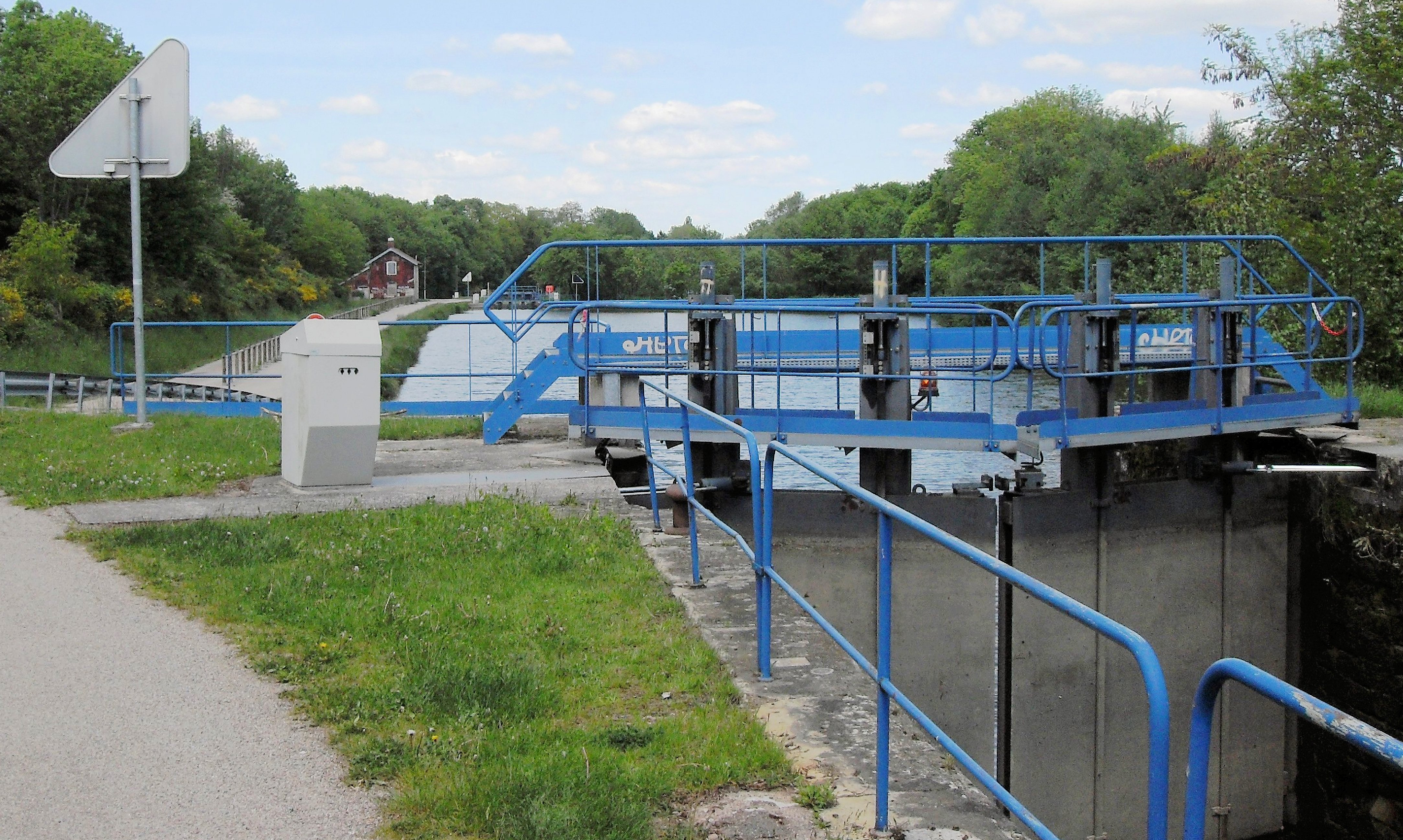 La chaîne d'écluses de Golbey, écluse 11M